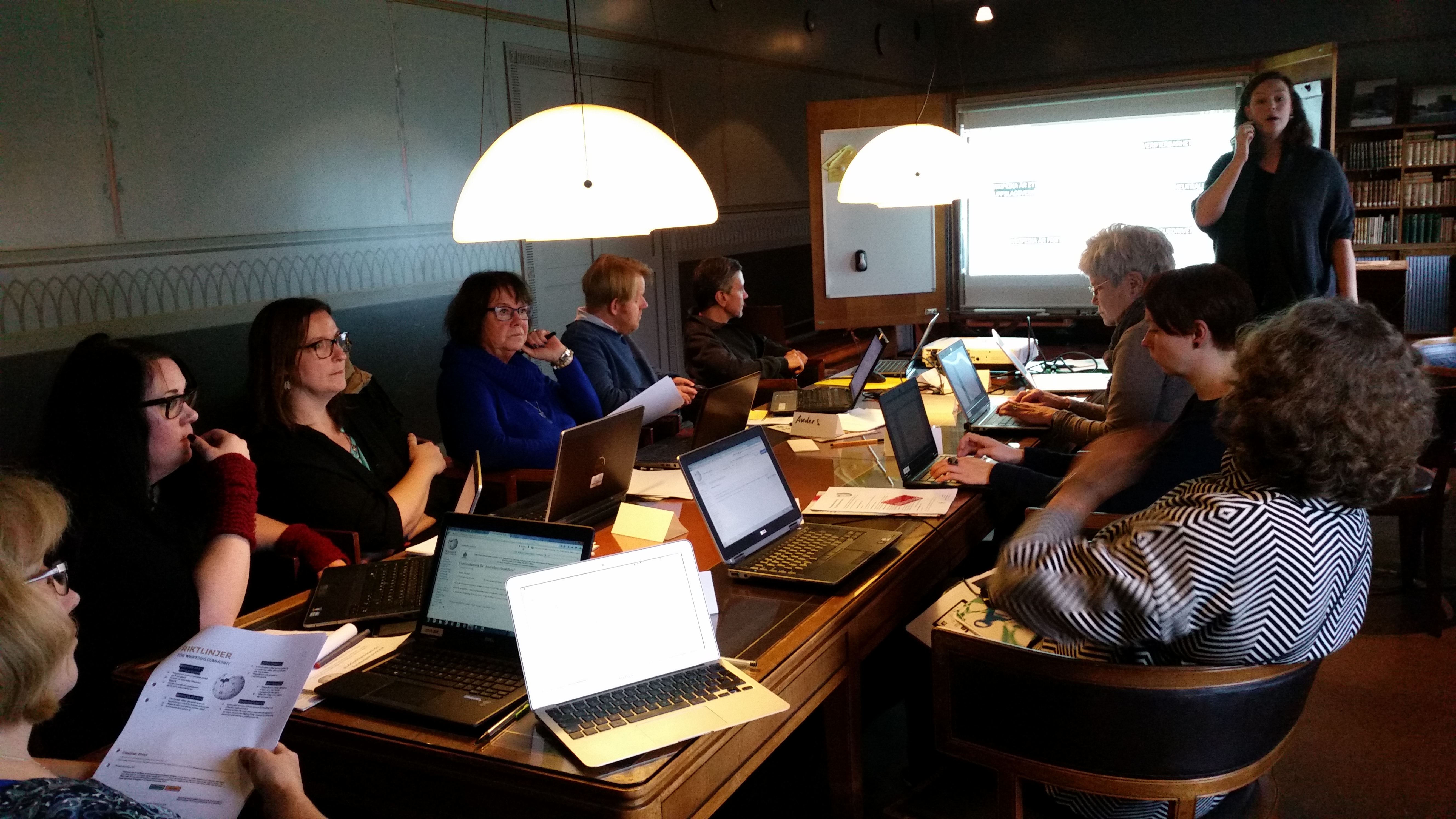 Presentation för bibliotekspersonal på Stockholms stadsbibliotek